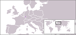 es el mapa de sarre Protectorado por francia entre 1949-1956